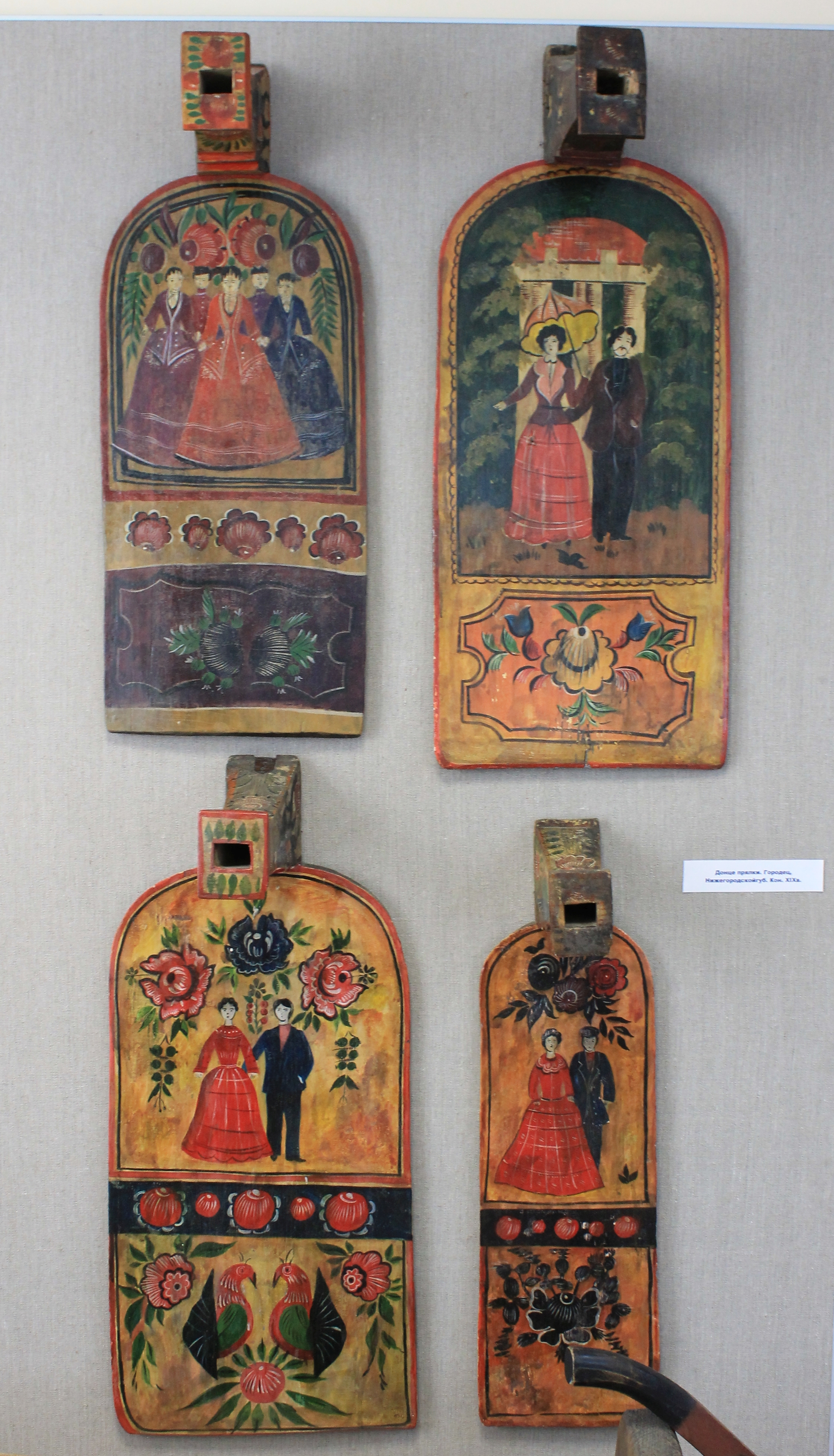 Донце-прялки, Городец, Нижегородская губерния, конец XIX века (Краеведческий музей Пучежского муниципального района)